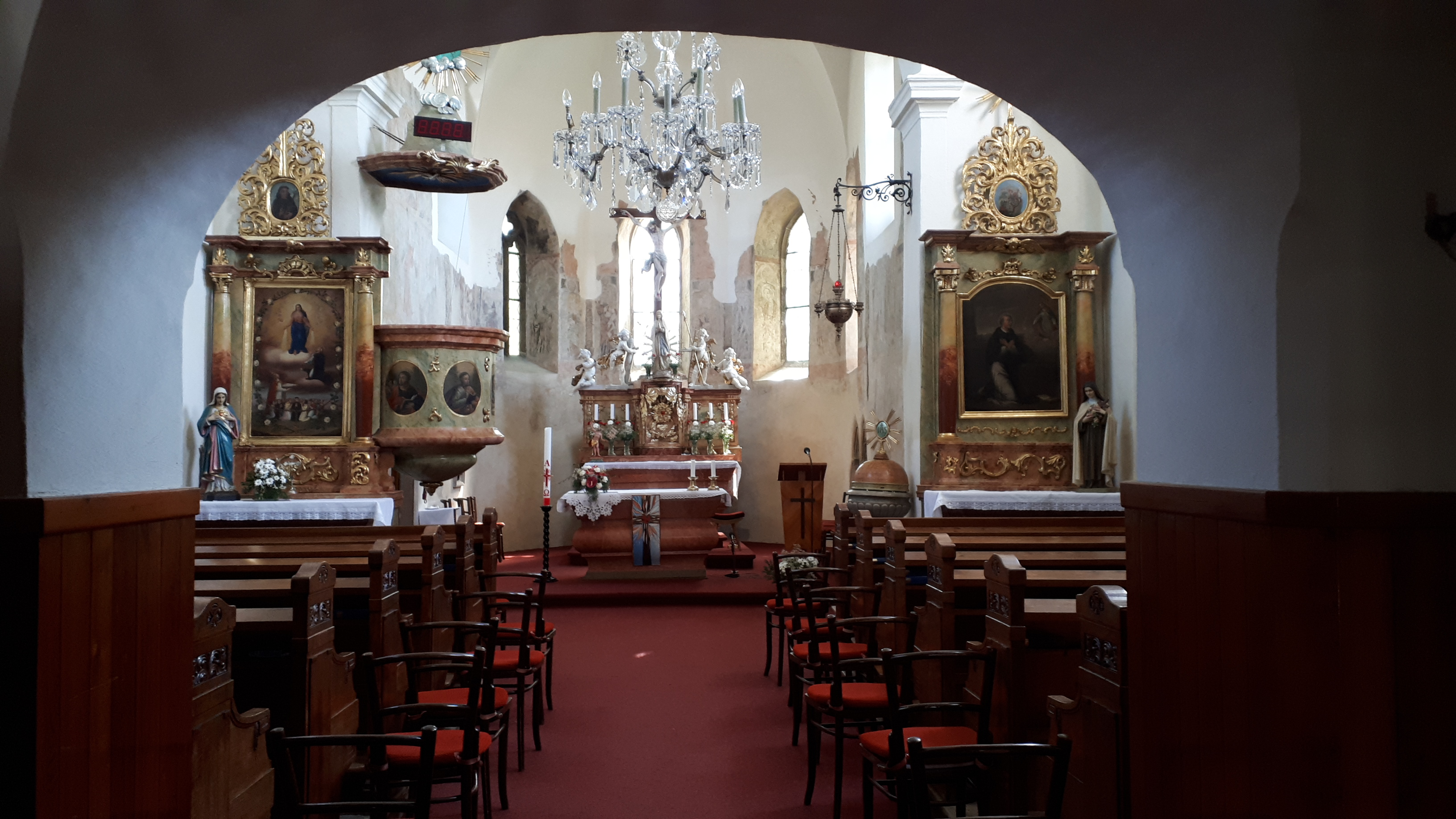 Drásov